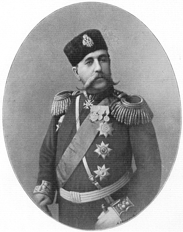 Манвелов Александр Николаевич, фото 1880-х годов